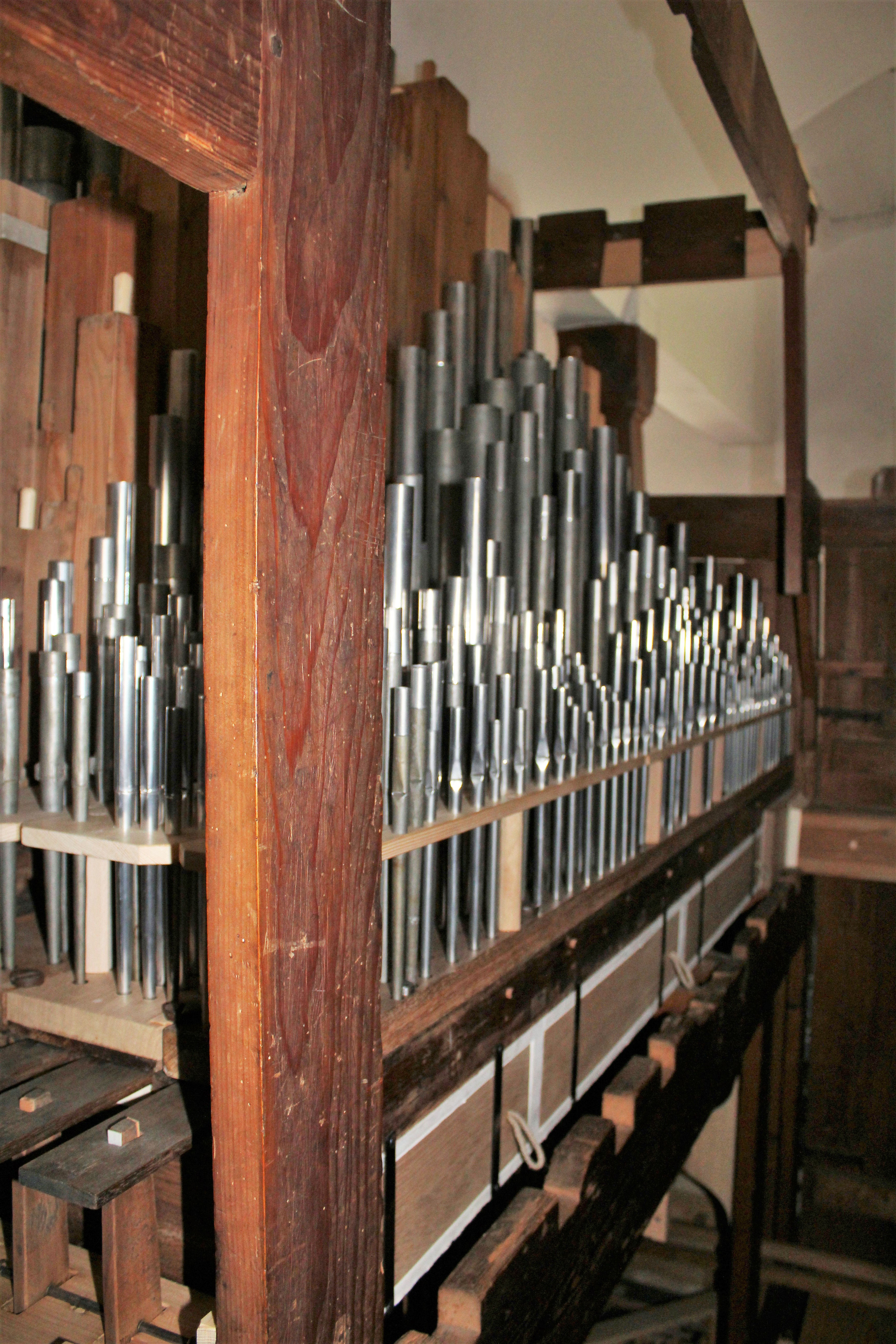 Evangelische Kirche Groß-Eichen, Gemeinde Mücke, Vogelsbergkreis, Hessen, Deutschland